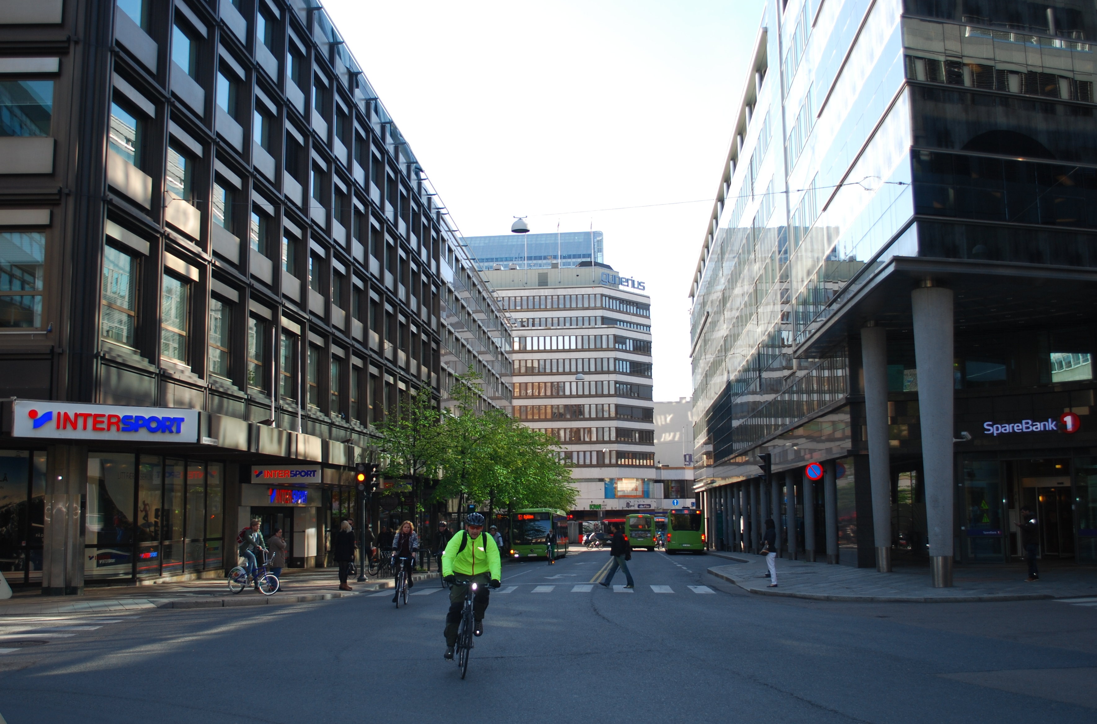 Hammersborggata, Oslo sentrum, sydøstlige del mellom Calmeyers gate nærmest og Storgata